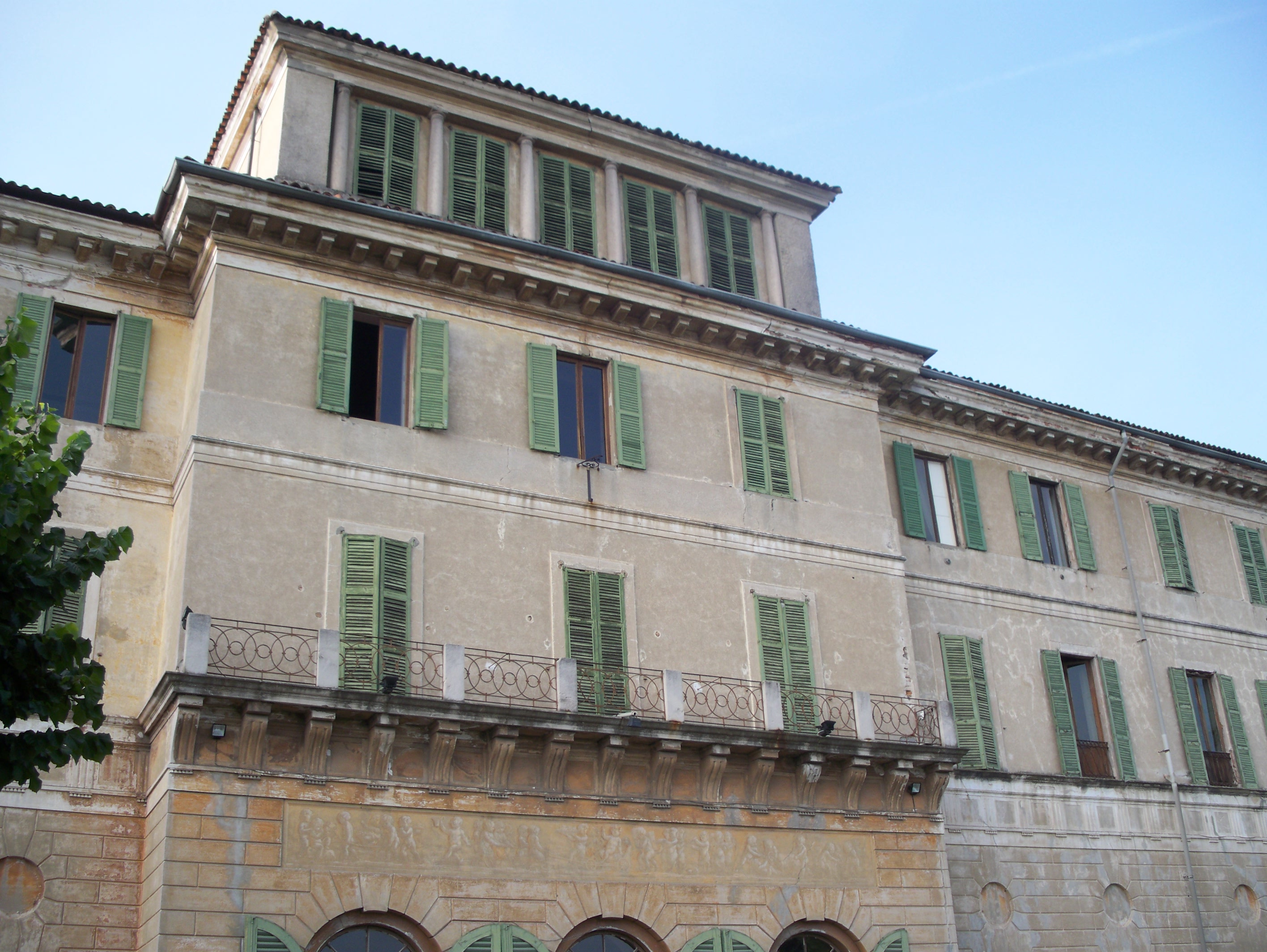 Villa Antona Traversi, Meda, Italia (facciata dal cortile interno)